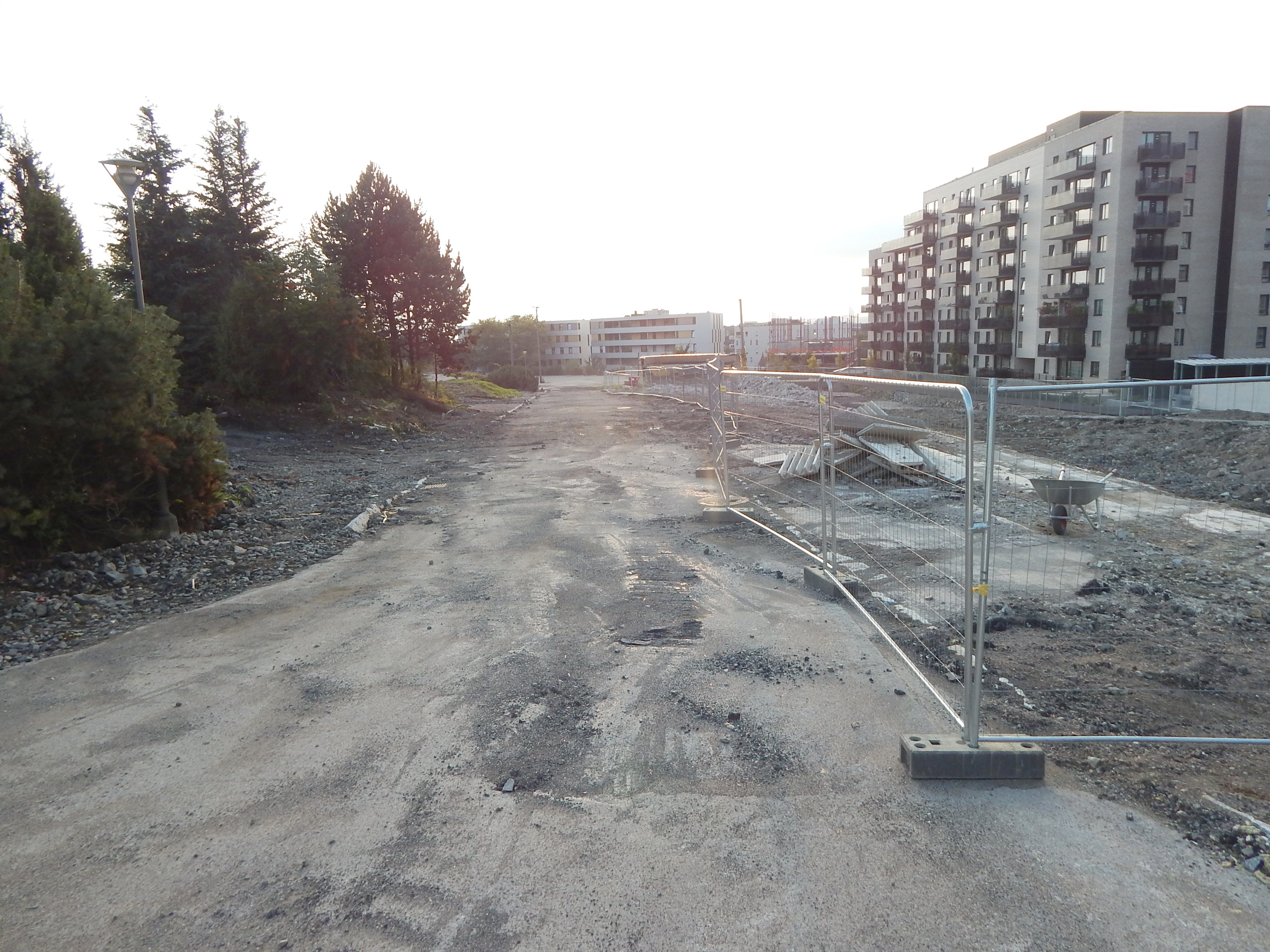 Hans Amundsens vei anno 2016